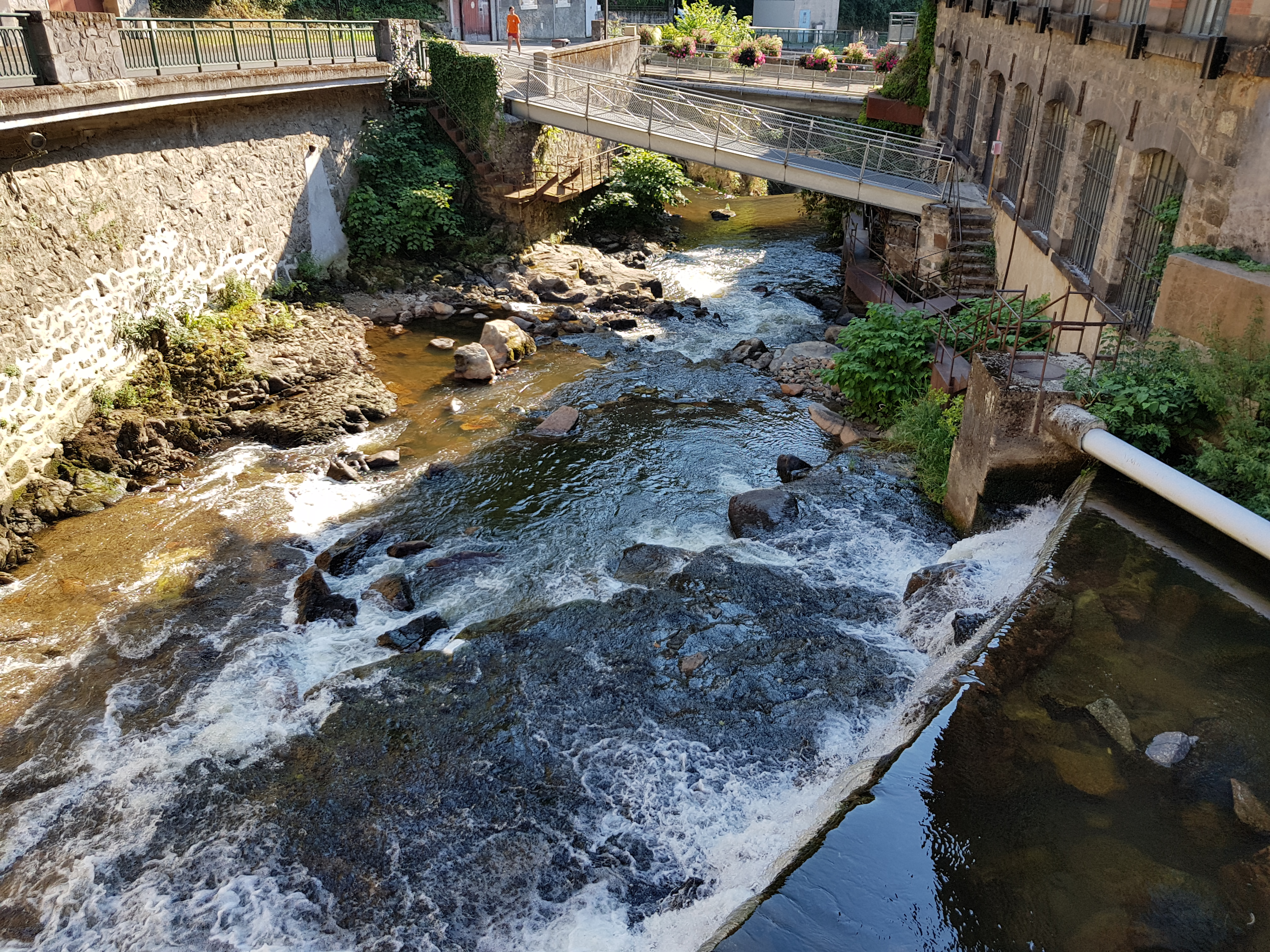 Usine du may